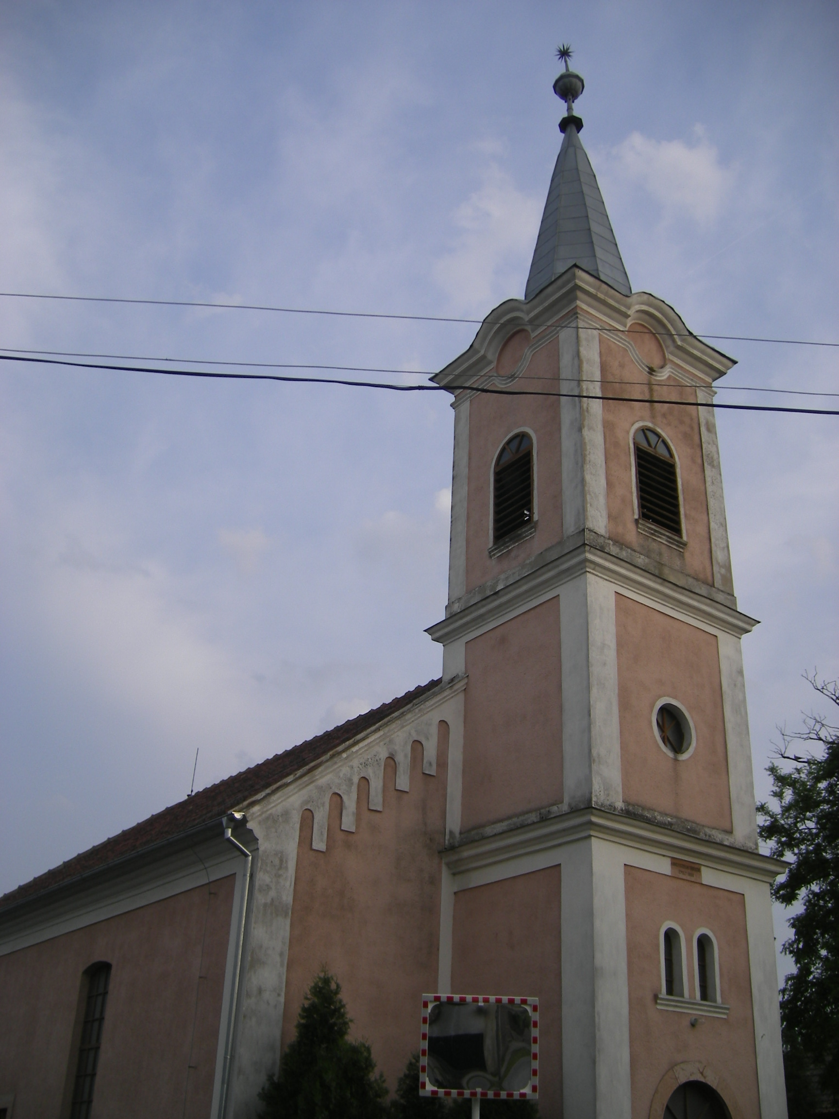 Ímely - református templom